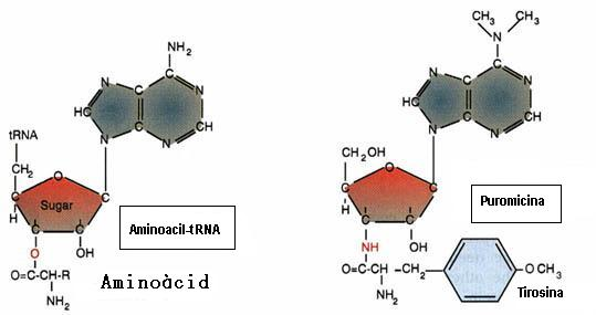 Estructura de la puromicina